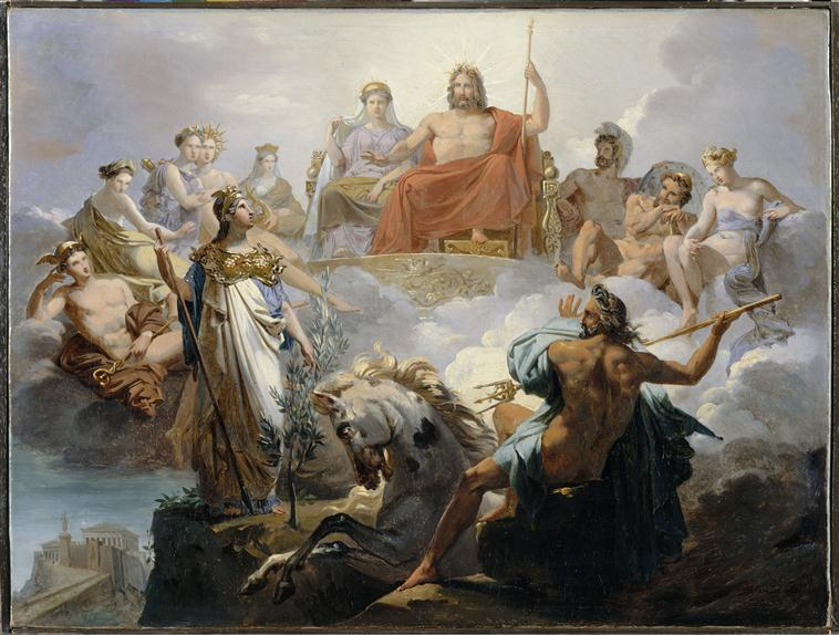 Bataille de Neptune et Athéna pour la possession de l'Attique